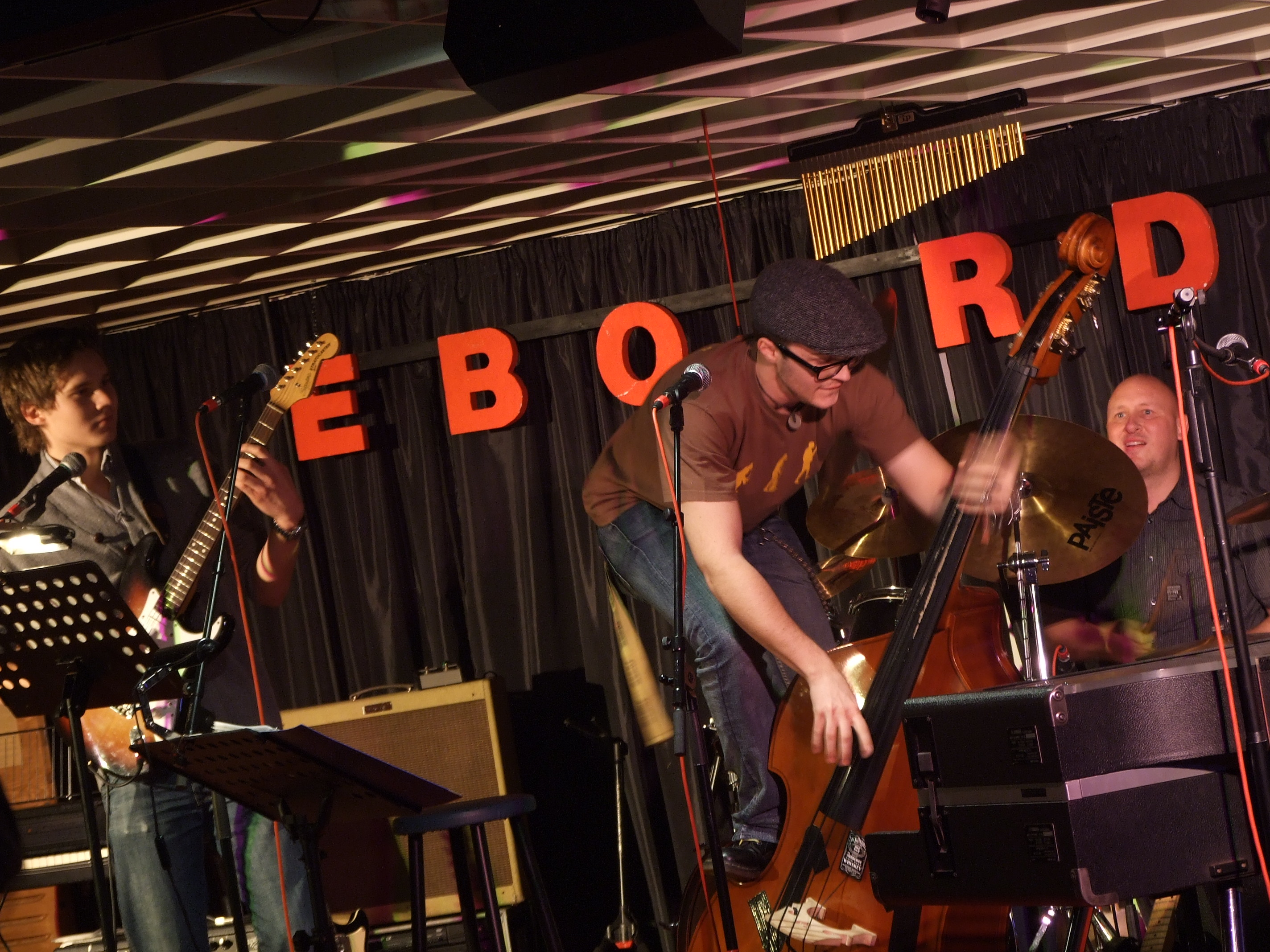 Akrobatische Einlage eines Bassisten auf der Bühne des Eboardmuseums